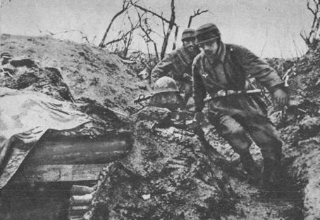 Paracadutisti tedeschi in azione nelle trincee difensive contro la testa di ponte di Salerno